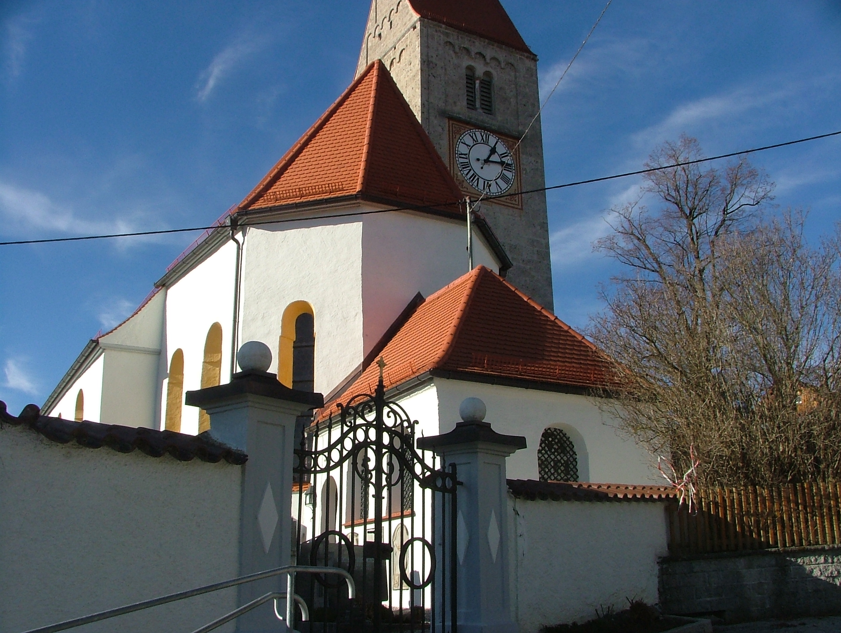 Probstried